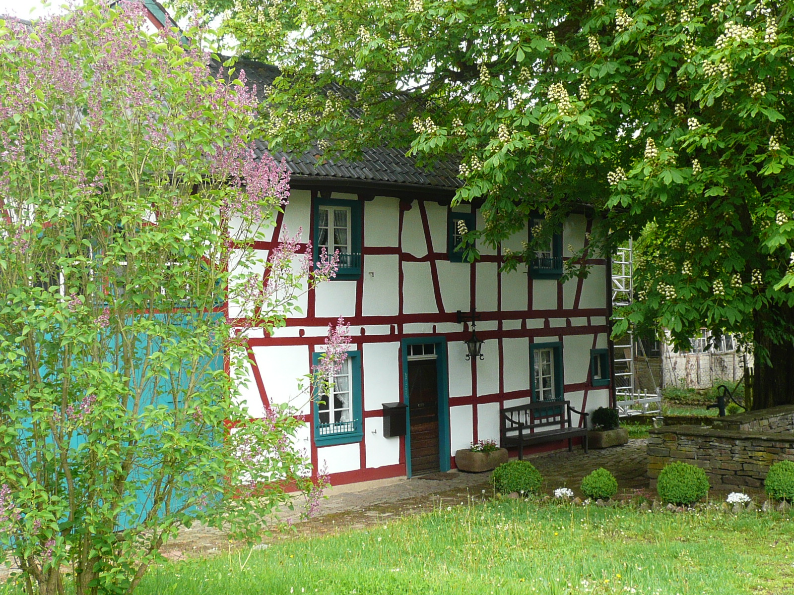 Fachwerkhaus, Bergstrasse 3 im Insul (Ahrtal)